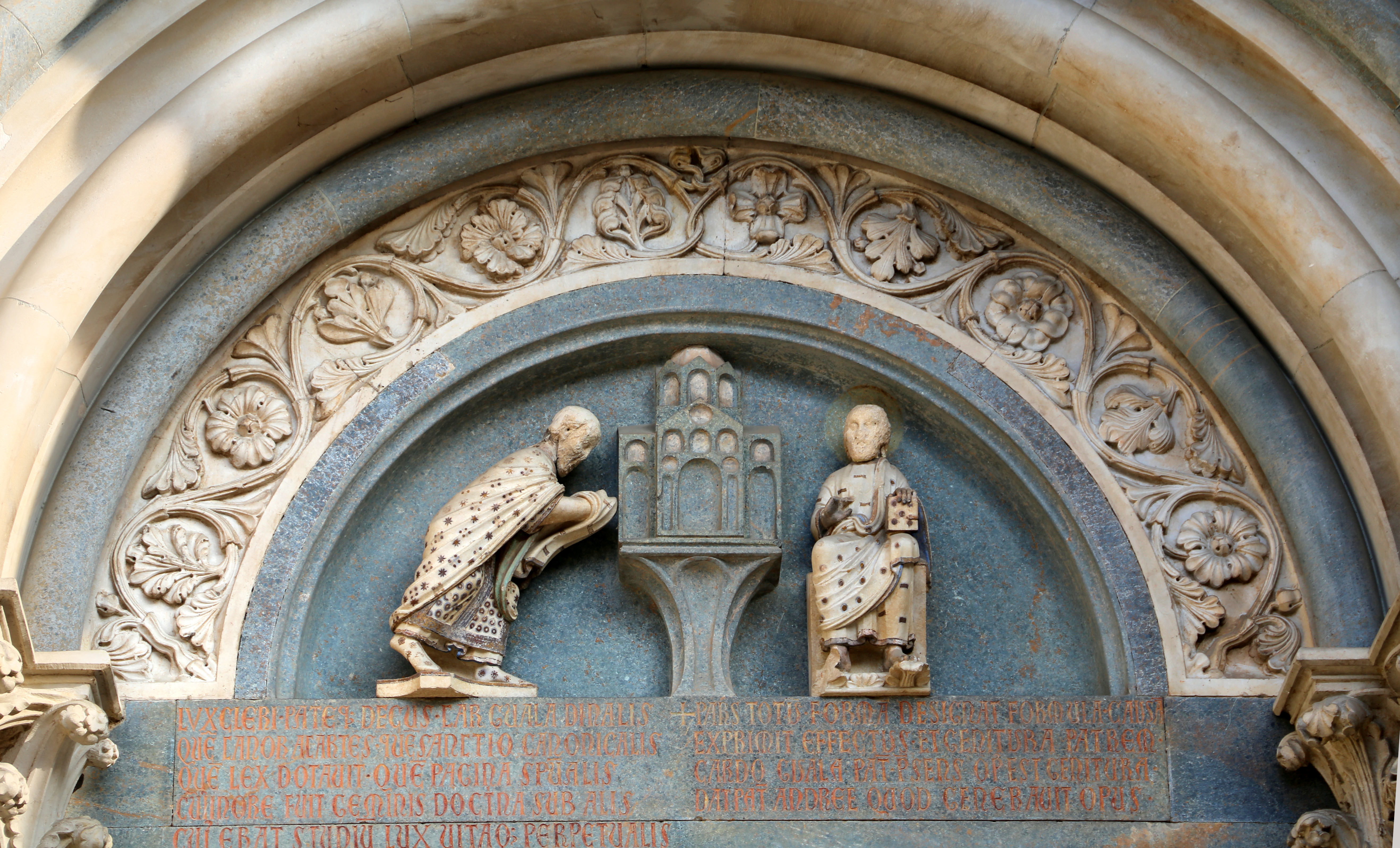 basilica di Sant'Andrea This is a photo of a monument which is part of cultural heritage of Italy.